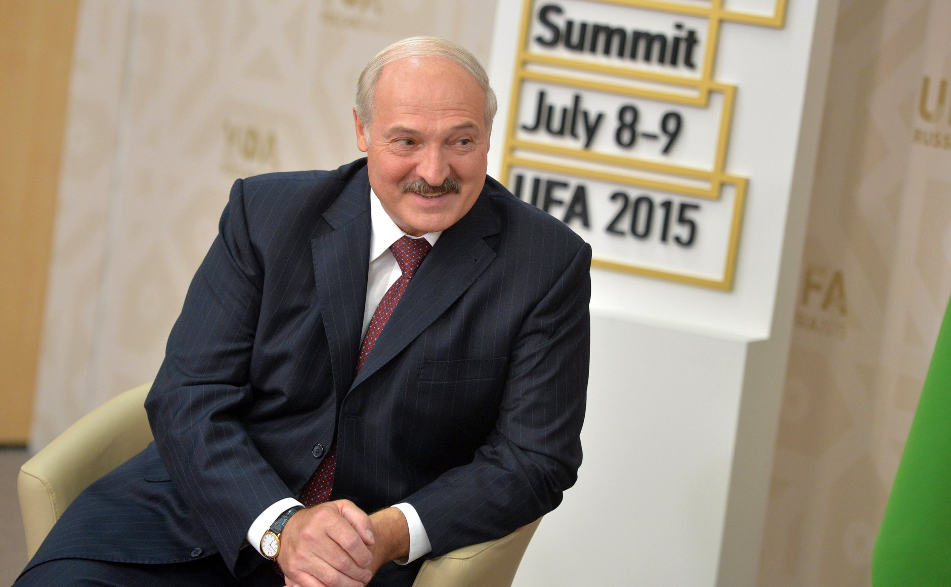 Встреча Президента России Владимира Путина с Президентом Белоруссии Александром Лукашенко